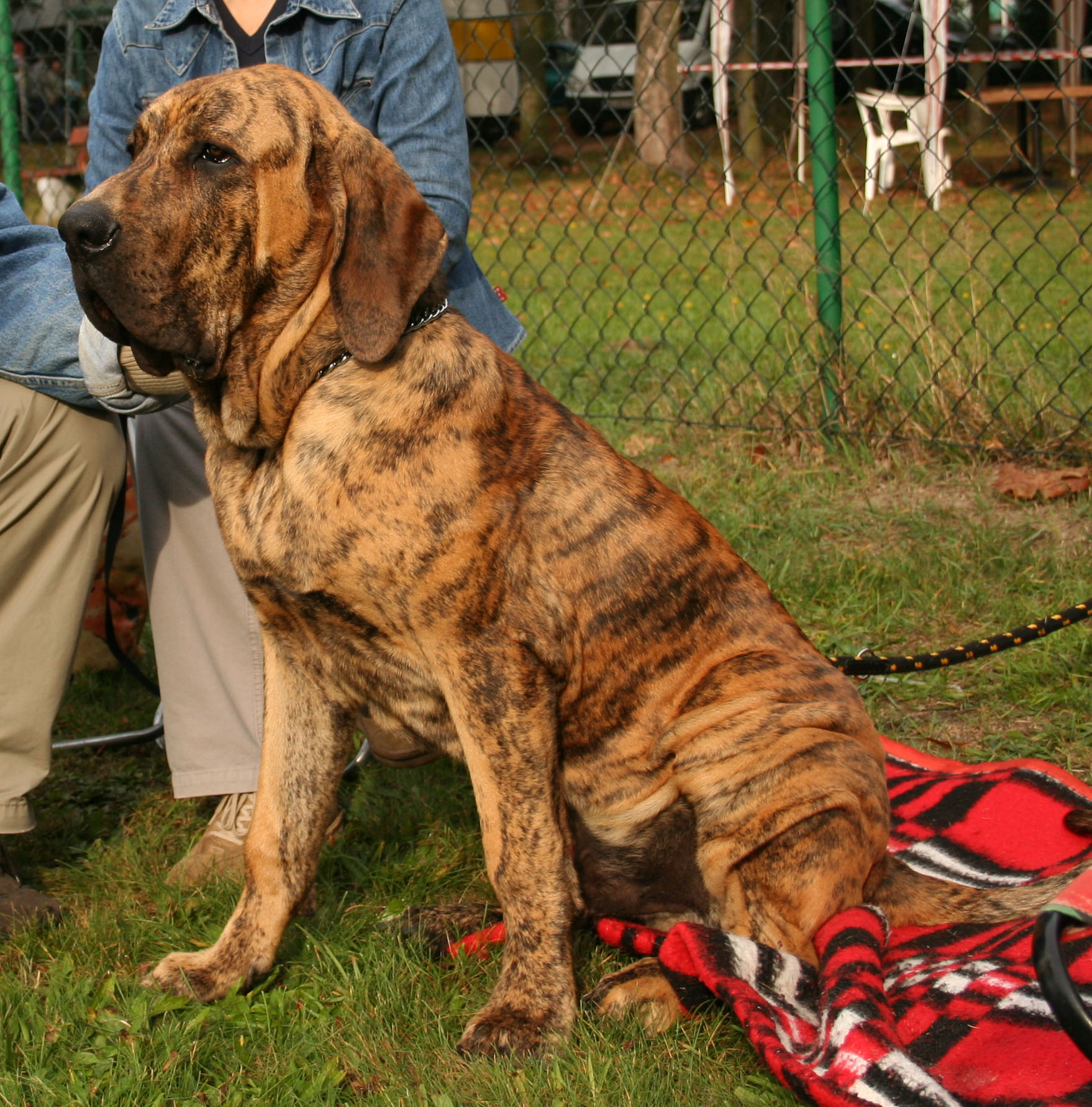 Fila brasileiro (ALMODOVAR Rio Grande - z hodowli RIO GRANDE)